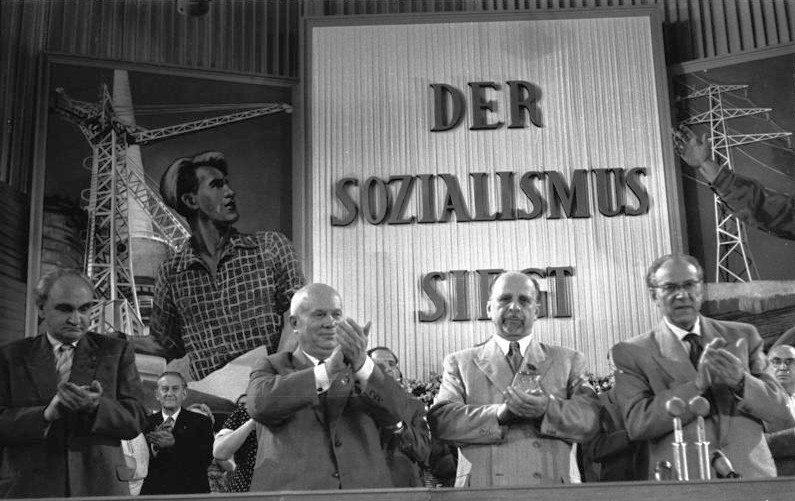 Zentralbild / 10.7.1958 V. Parteitag der SED vom 10. bis 16.7.1958 in der Werner Seelenbinder-Halle, Berlin 1. Tag UBz: Beifall der Delegierten nach dem Referat Walter Ulbrichts. Von links nach rechts: Heinrich Rau, Mitglied des Politbüros der SED; N.S. Chruschtschow, Erster Sekretär des ZK der KPdSU; Walter Ulbricht, Erster Sekretär des ZK der SED, und Ministerpräsident Otto Grotewohl, Mitglied des Politbüros des ZK der SED. Abgebildete Personen: Grotewohl, Otto: Ministerpräsident, stellvertretender Staatsratsvorsitzender, DDR (GND 118542680) Ulbricht, Walter: Staatsratsvorsitzender, Erster Sekretär des Zentralkomitees (ZK) der SED, Vorsitzender des Nationalen Verteidigungsrates, DDR (GND 118625179) Chruschtschow, Nikita S.: Ministerpräsident, erster Sekretär der KP, Sowjetunion (GND 118638378) Rau, Heinrich: Minister für Außen- und Innerdeutschen Handel, stellvertretender Ministerpräsident, SED, DDR (GND 118598554)